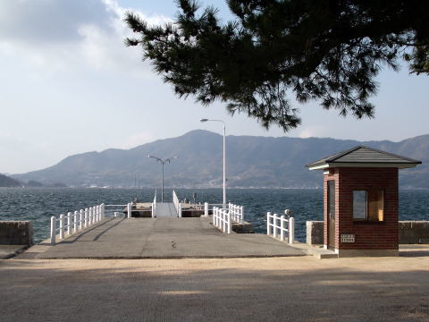 海上自衛隊第1術科学校表桟橋